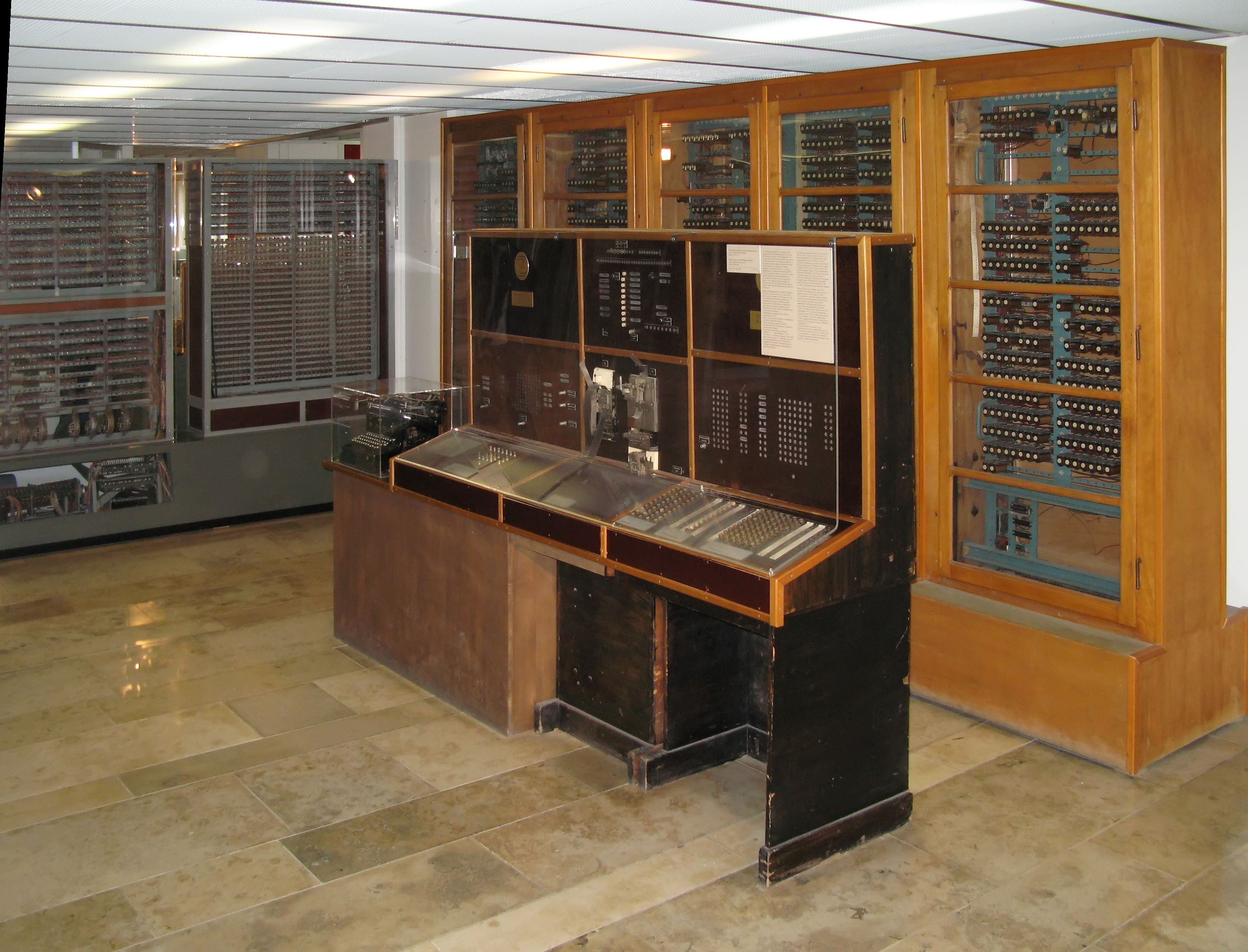 Der einzige Zuse Z4 Standort: Deutsches Museum, München